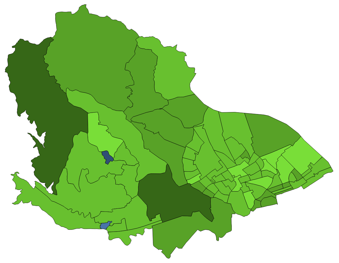 顏色對照表